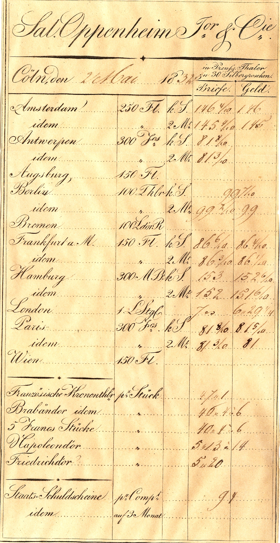 Bankhaus Oppenheim Kontoauflistung für Farina